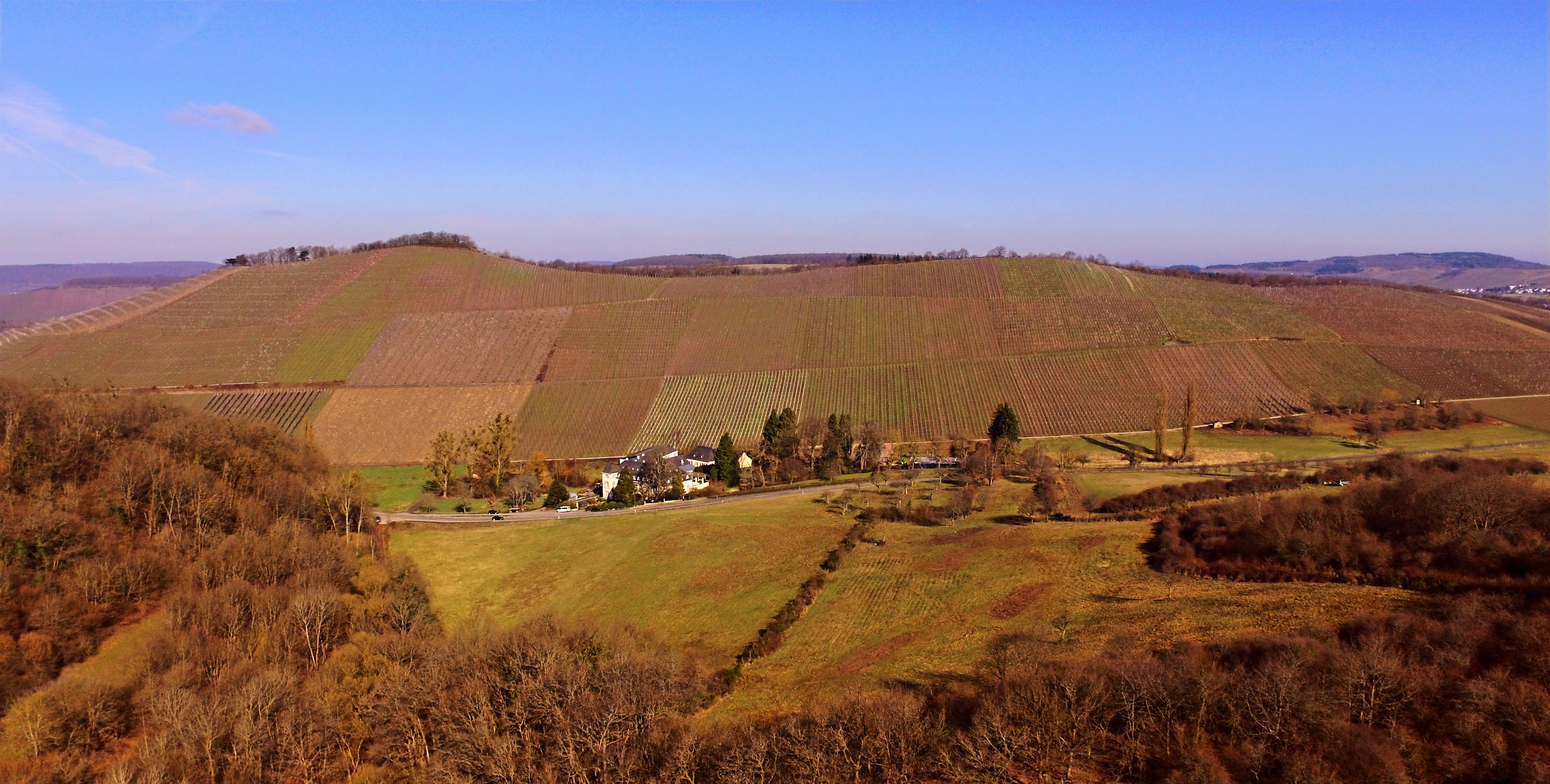 Weinberg und Weinlage Scharzhofberg (Wiltingen) von Süden. Es ist nahezu der gesamte Weinberg zu sehen